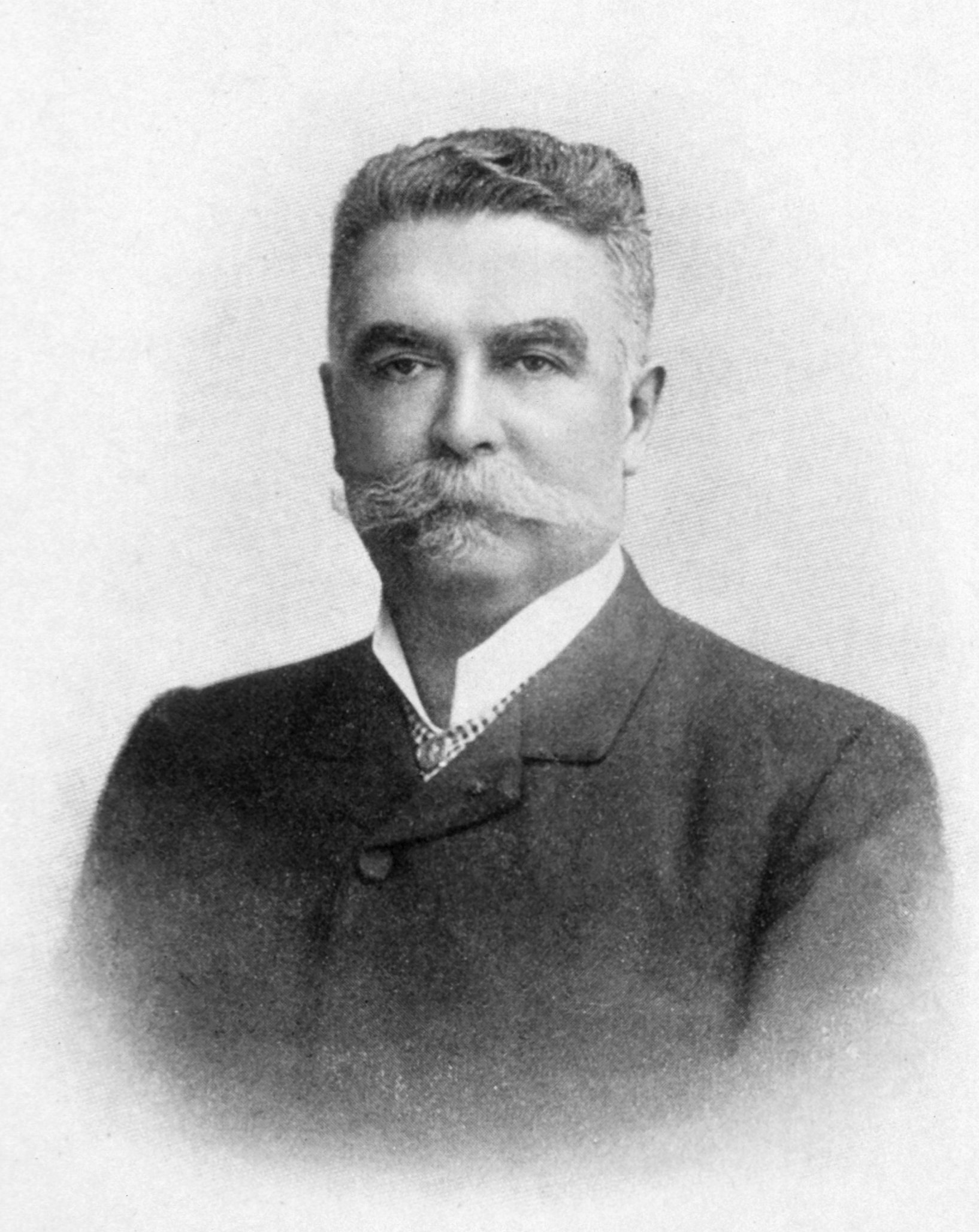 Bild des Chirurgen und Gynäkologen Paul Ferdinand Segond